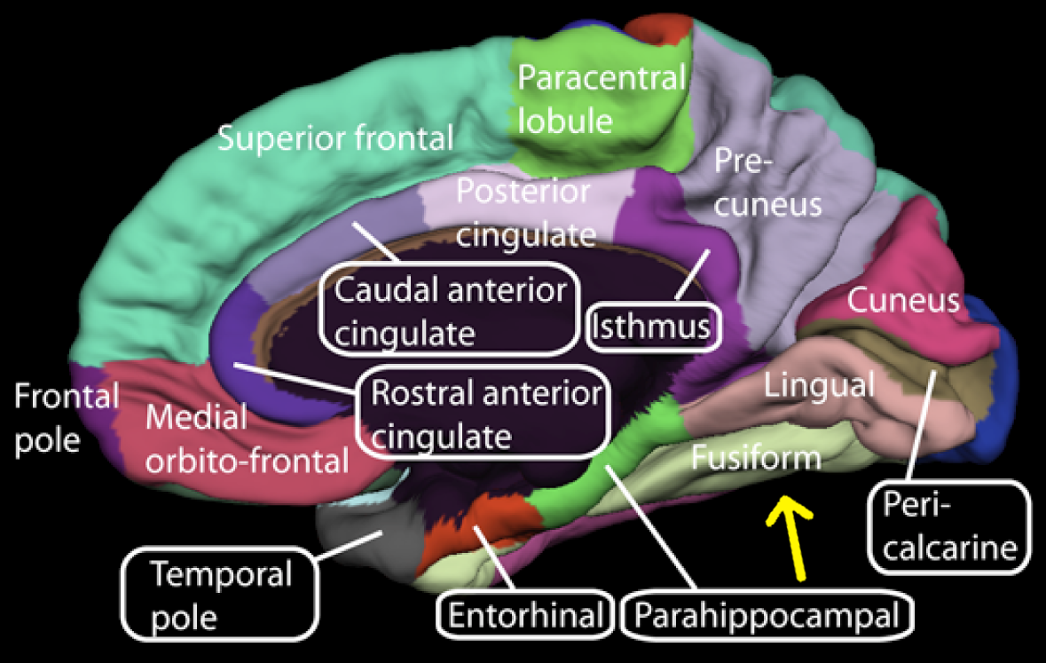 fusiform gyrus.